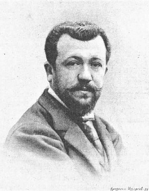 Henri Lavedan par Otto Wegener